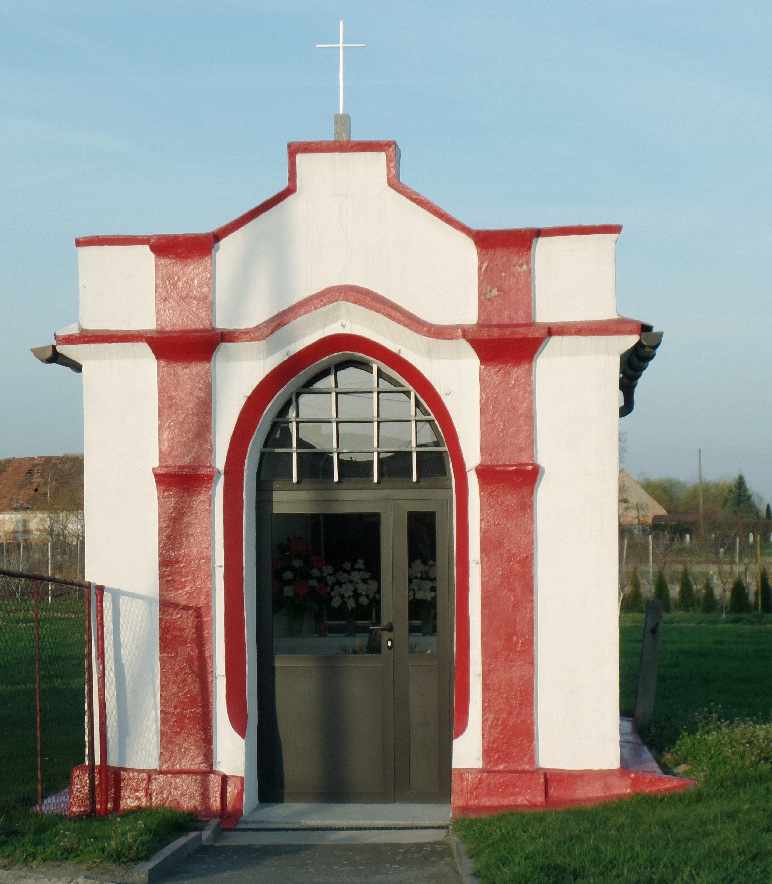 Meszno, kaplica pw. św. Antoniego